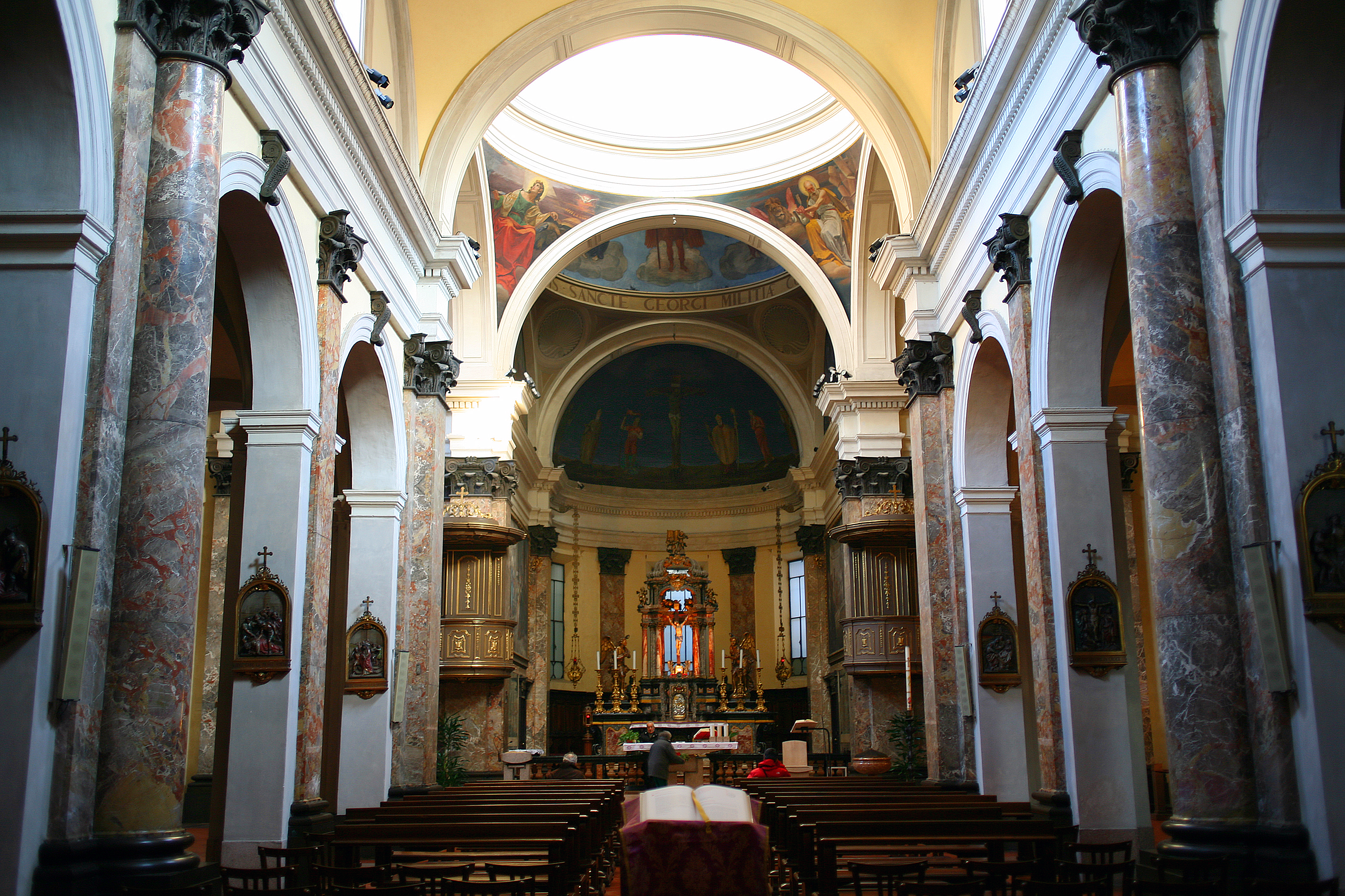 Veduta della navata maggiore della chiesa di San Giorgio al Palazzo, Milano